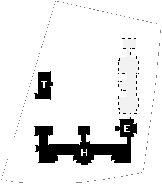 Lehrerseminar Backnang, schematisierter Lageplan. H: Hauptgebäude, T: Turnhalle, E: Küchenbau mit Essensaal, grau: geplante, aber nie realisierte Präparandenanstalt